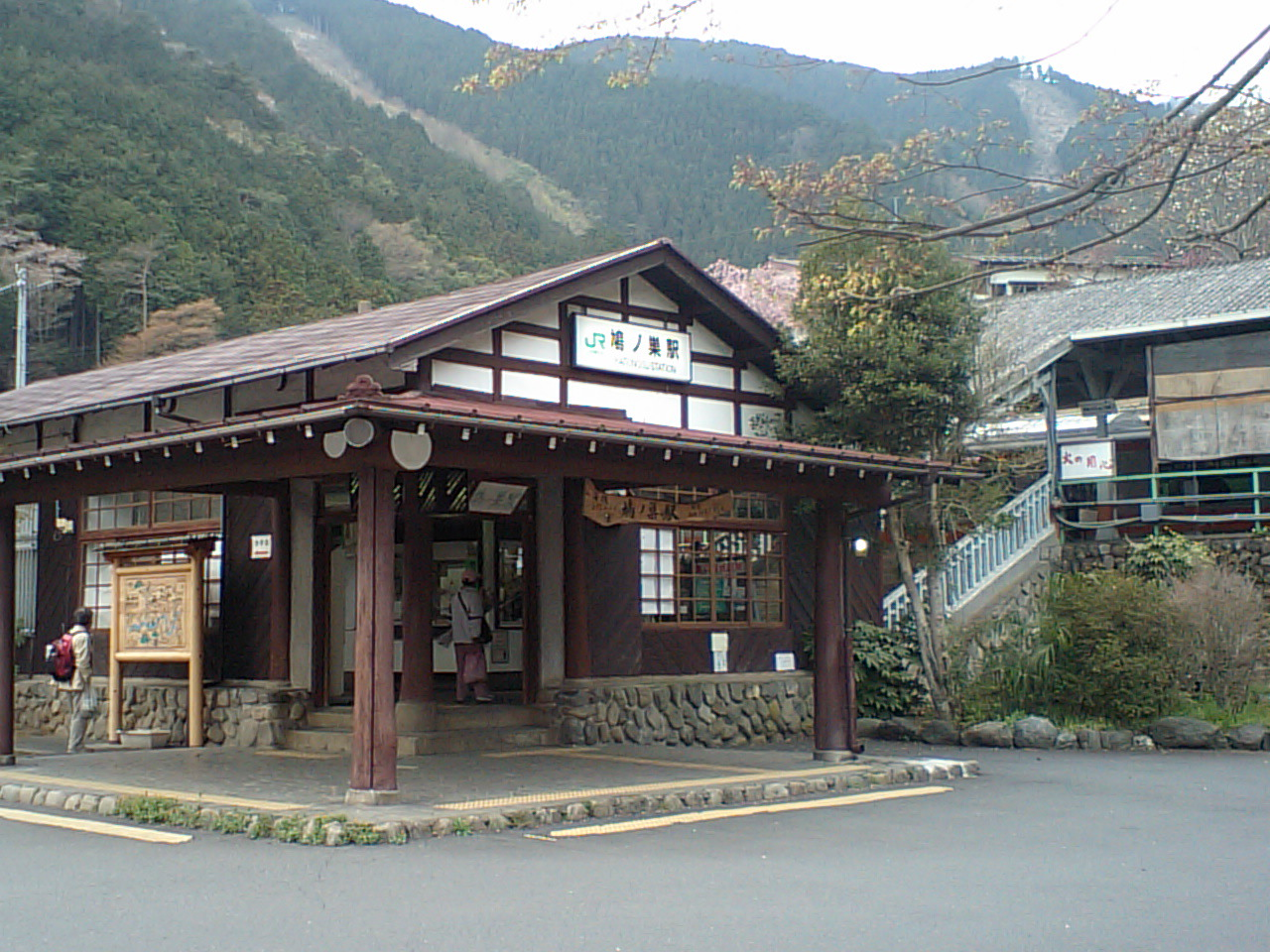 鳩ノ巣駅 Okutama Town TOKYO JAPAN